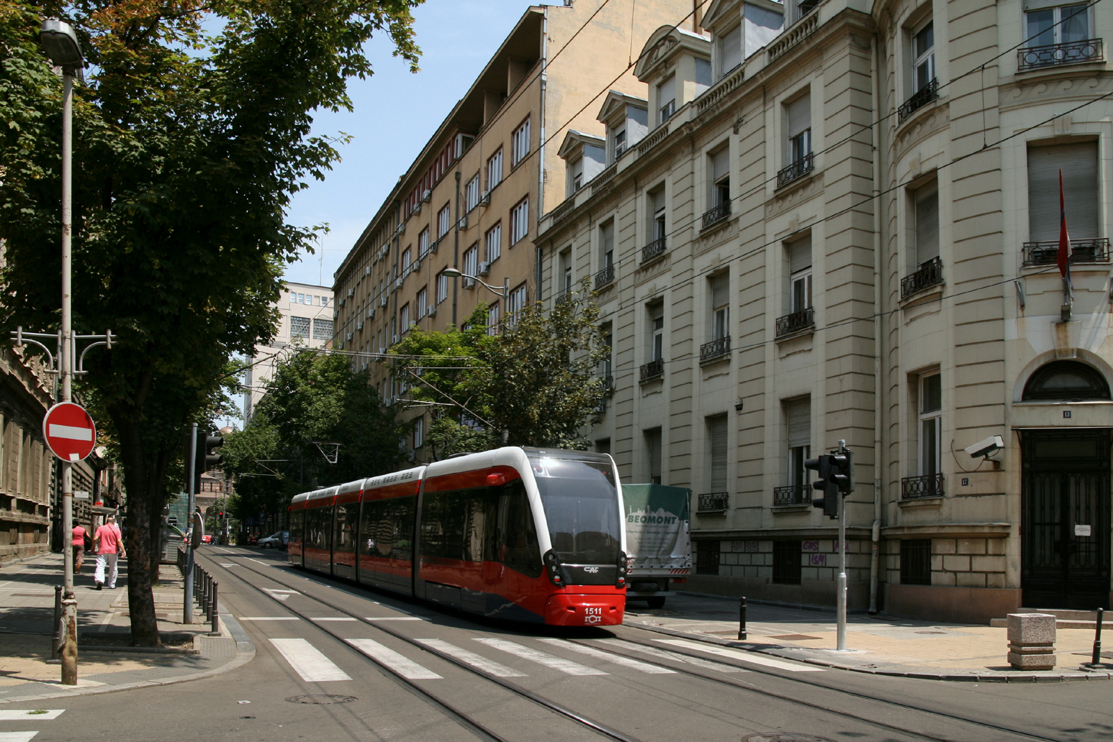 Tramway à Belgrade